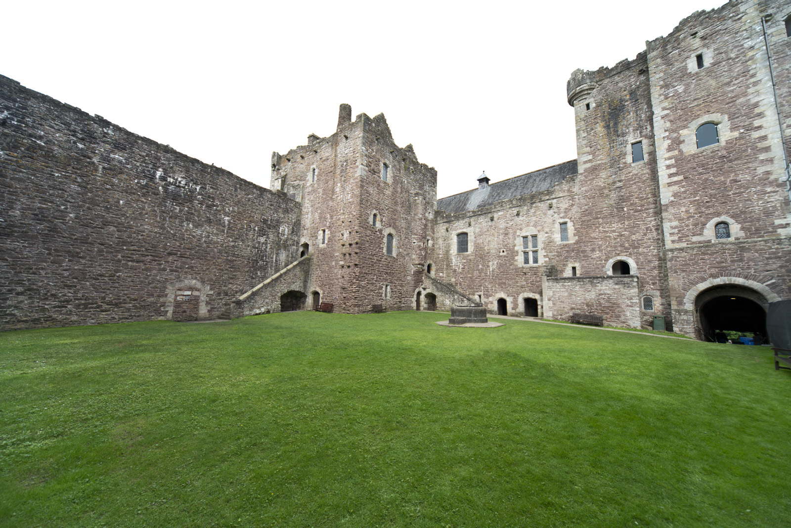 And Winterfell